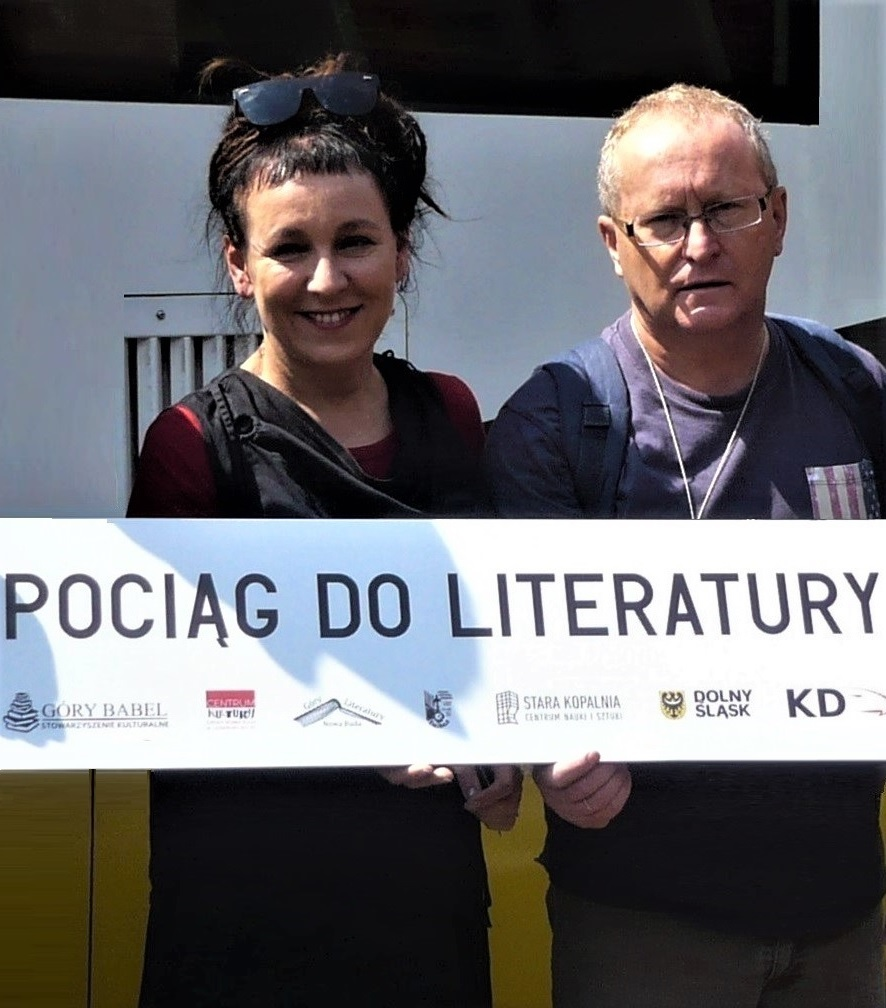 Olga Tokarczuk, Karol Maliszewski